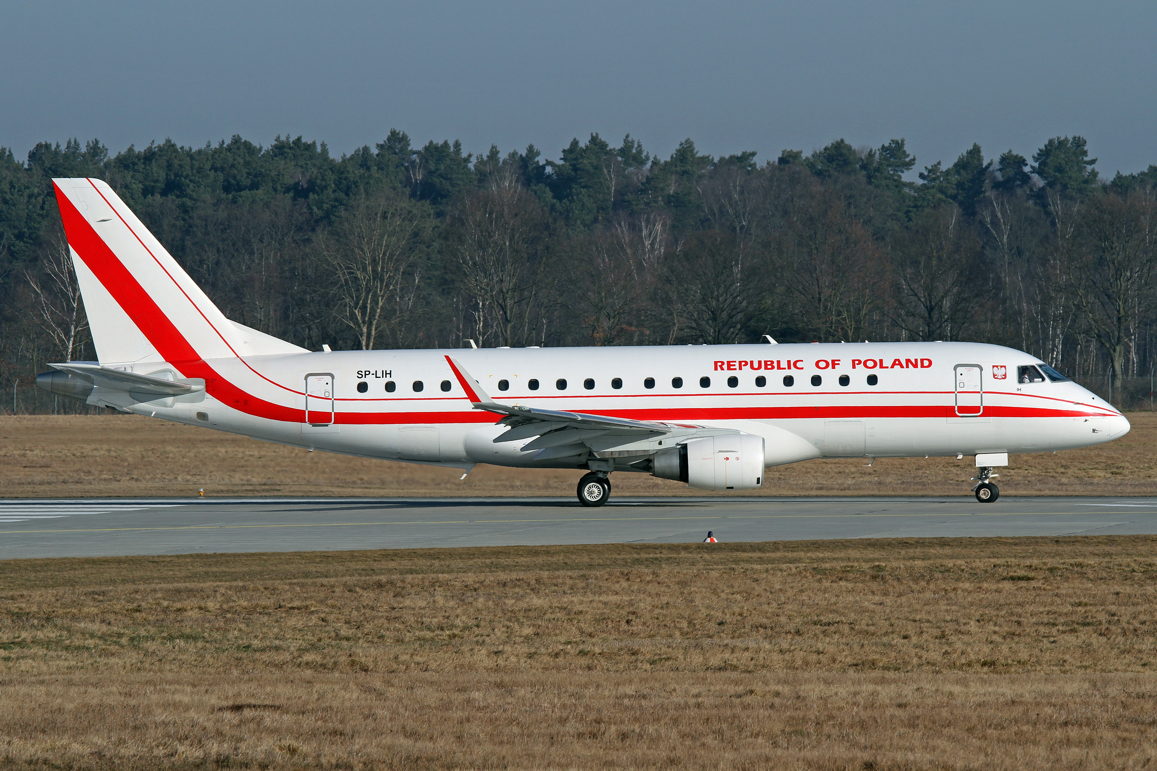 HAJ 06-03-13